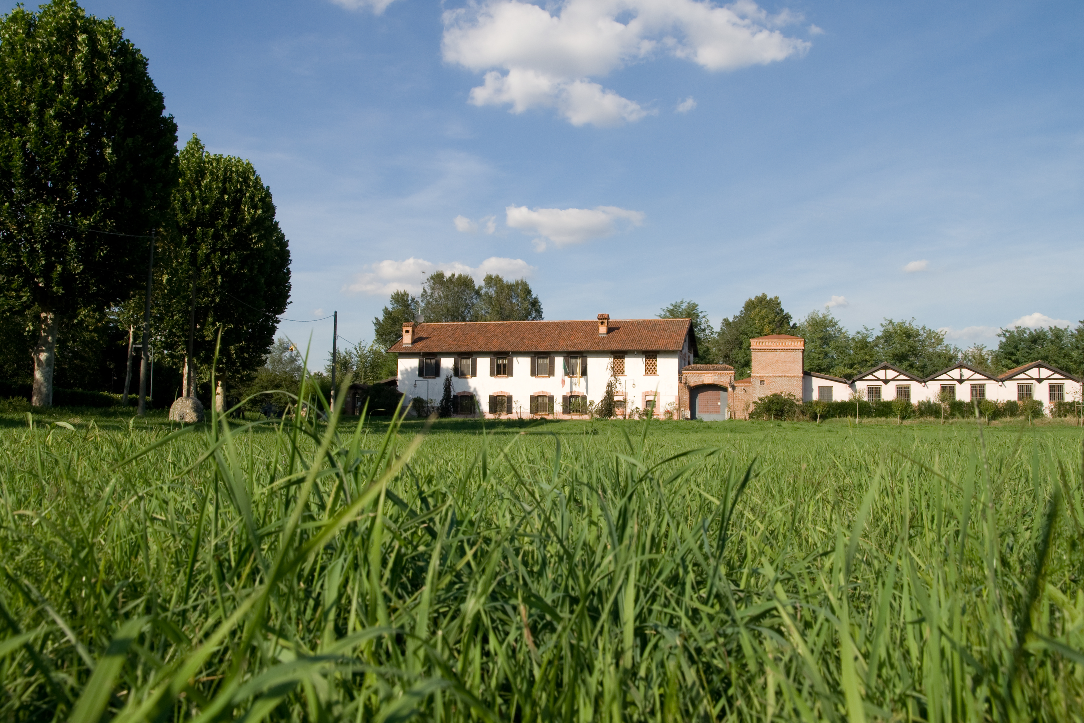 Mulino Lampugnani, Parabiago This is a photo of a monument which is part of cultural heritage of Italy.